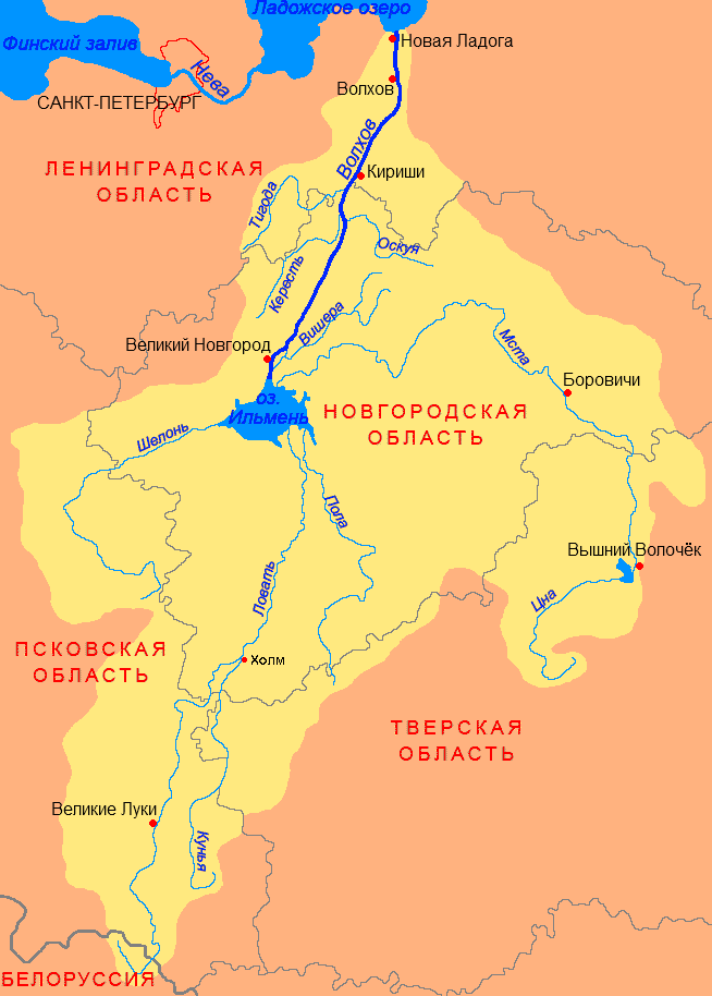 Схема бассейна реки Волхов и озера Ильмень